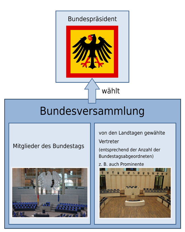 Schema der Bundesversammlung zur Wahl der deutschen Bundespräsidenten